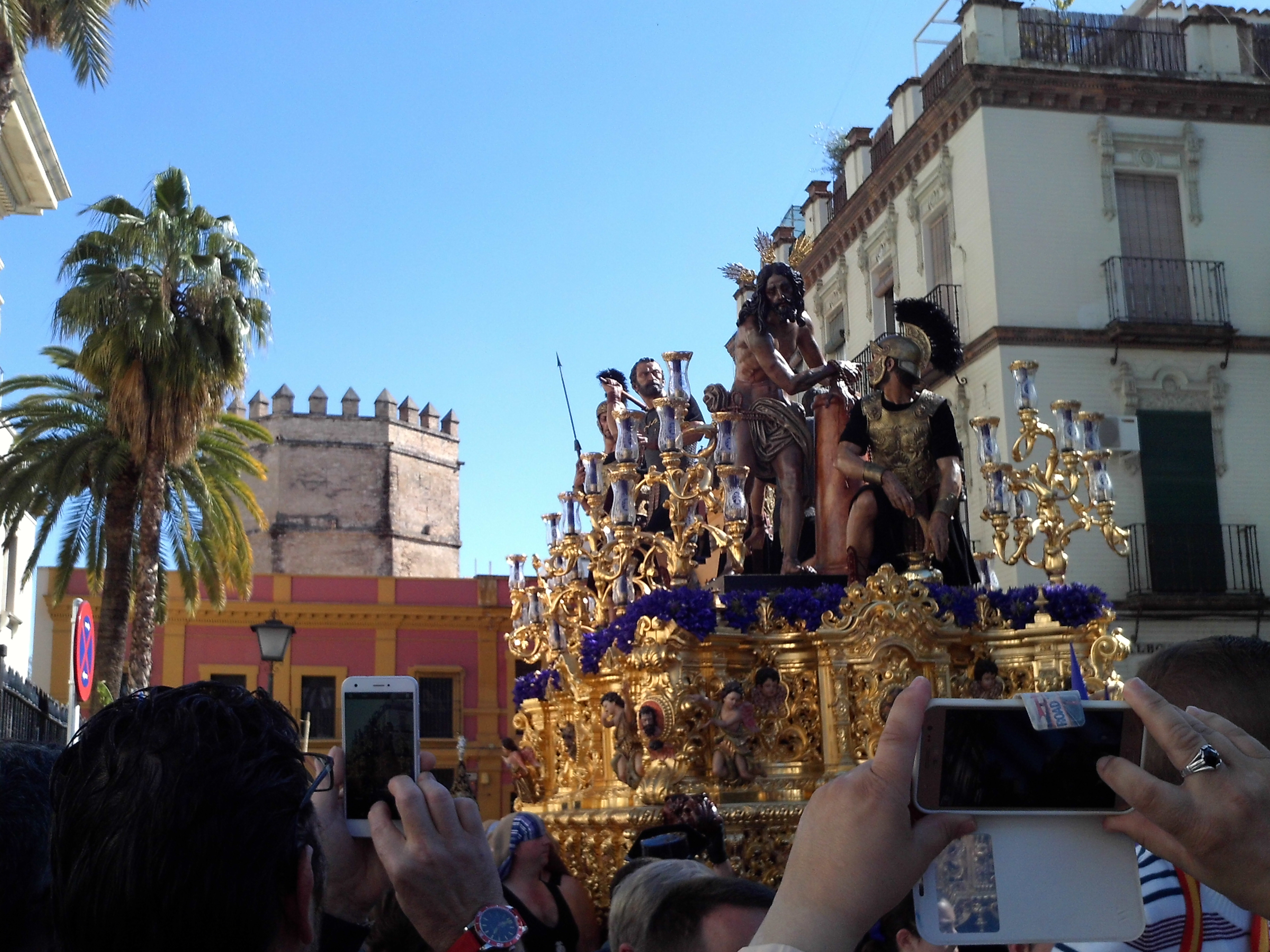 Jesús de la Columna. Hermandad de las Cigarreras. Sevilla, Andalucía, España.